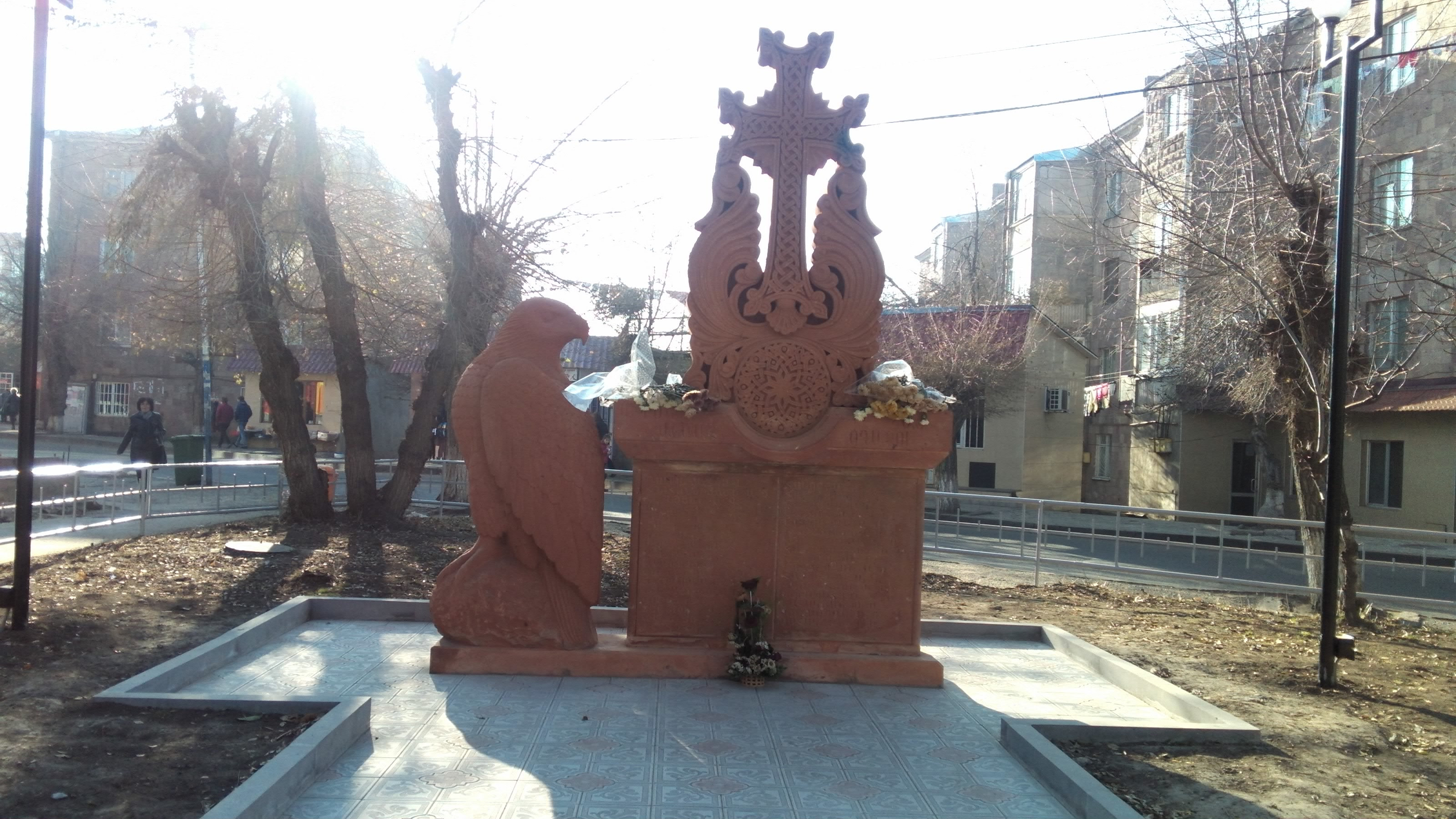 Զոհված օդաչուներին նվիրված հուշարձան